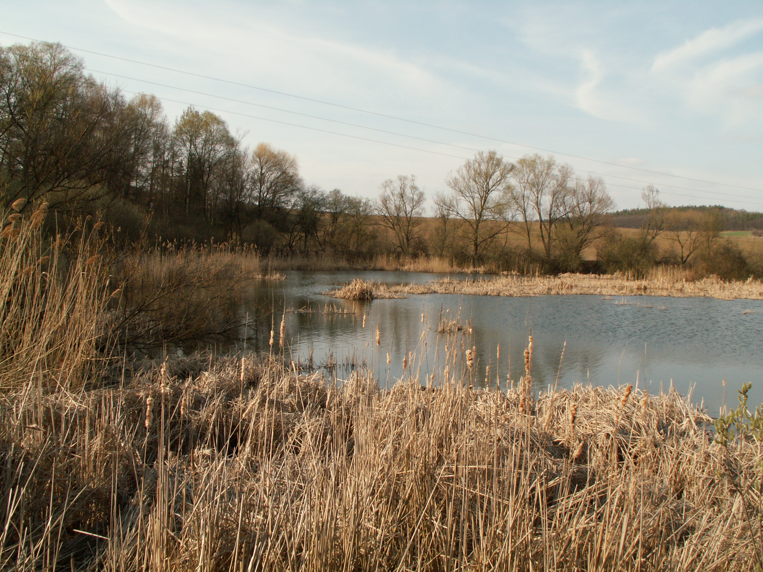 Pohled z pravého břehu na část Žebětínského rybníka poblíž vtoku.